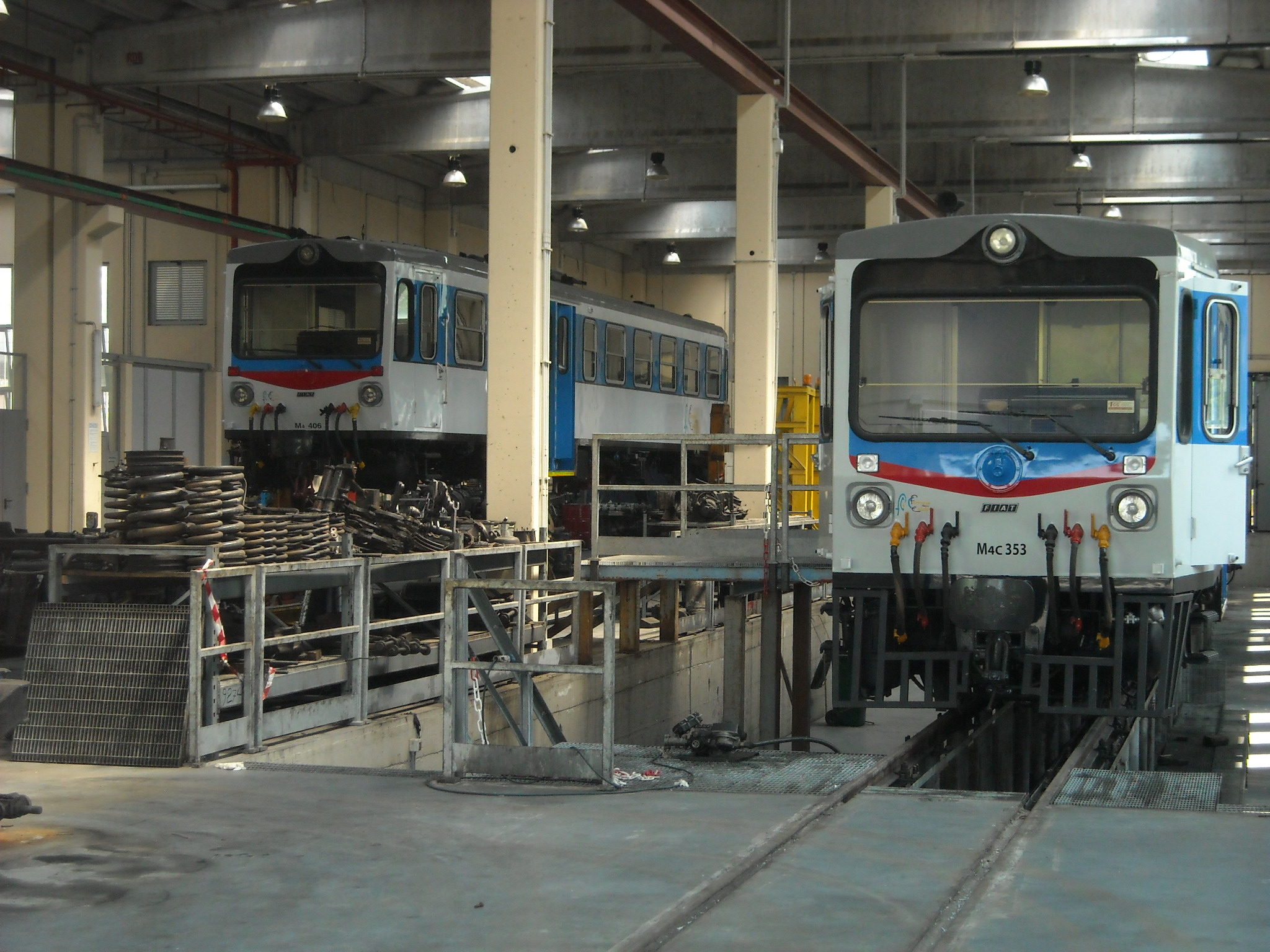 M4.353c ed M4.406 appena revampizzate a Cosenza